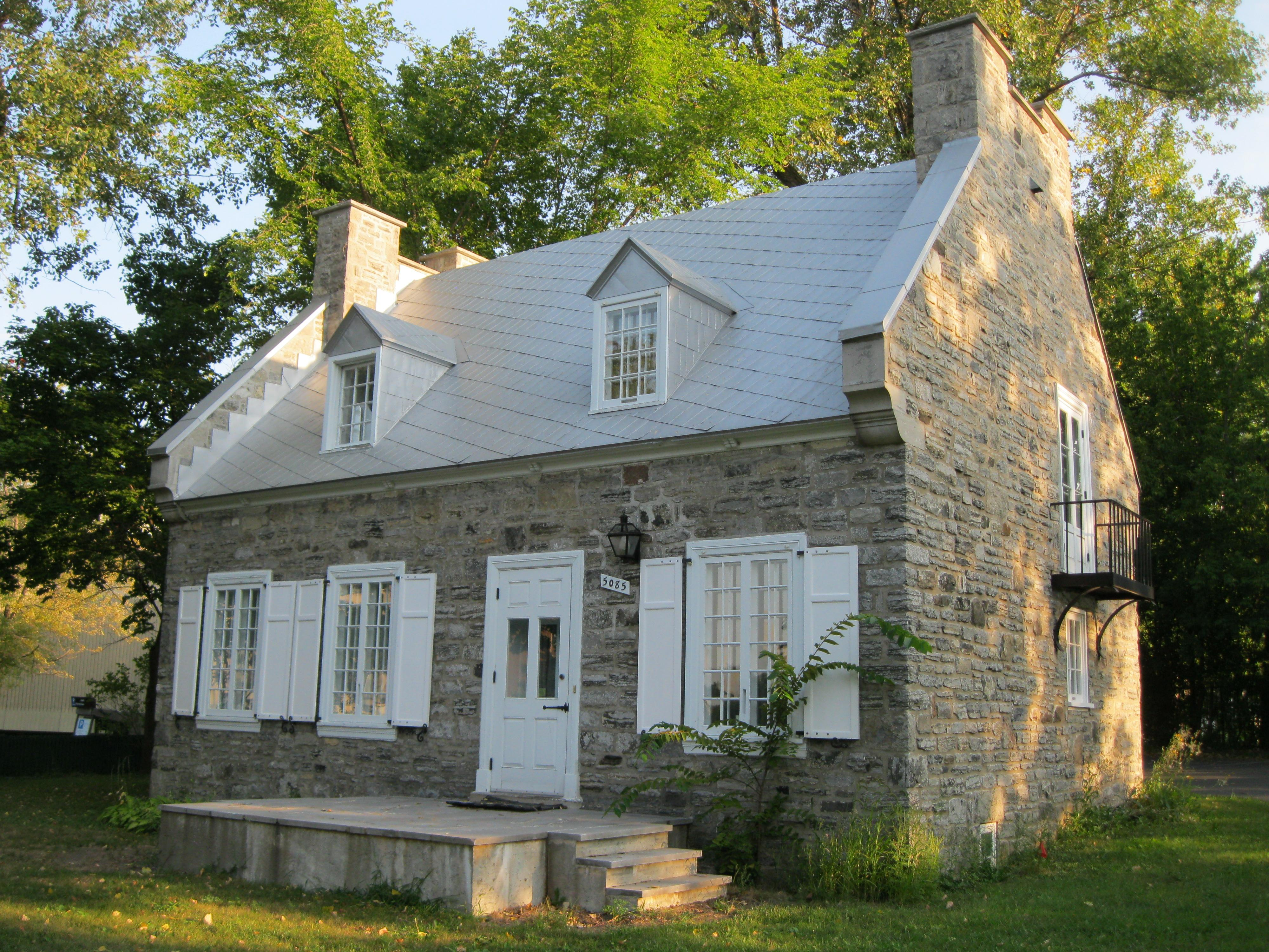 La maison Simon-Lacombe (ou maison de la Côte-des-Neiges ou maison Jarry-Dit-Henrichon), classée en 1957, est une résidence d'inspiration française bâtie vers 1766 et reconstruite en 1957. Elle est située au 5085, avenue Decelles, dans l'arrondissement Côte-des-Neiges-Notre-Dame-de-Grâce, à Montréal.